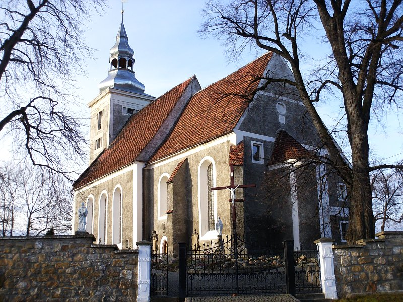 Lubiatów - kościół filialny p.w. Najświętszego Serca Jezusa (zabytek nr rejestr. A/2206/539)